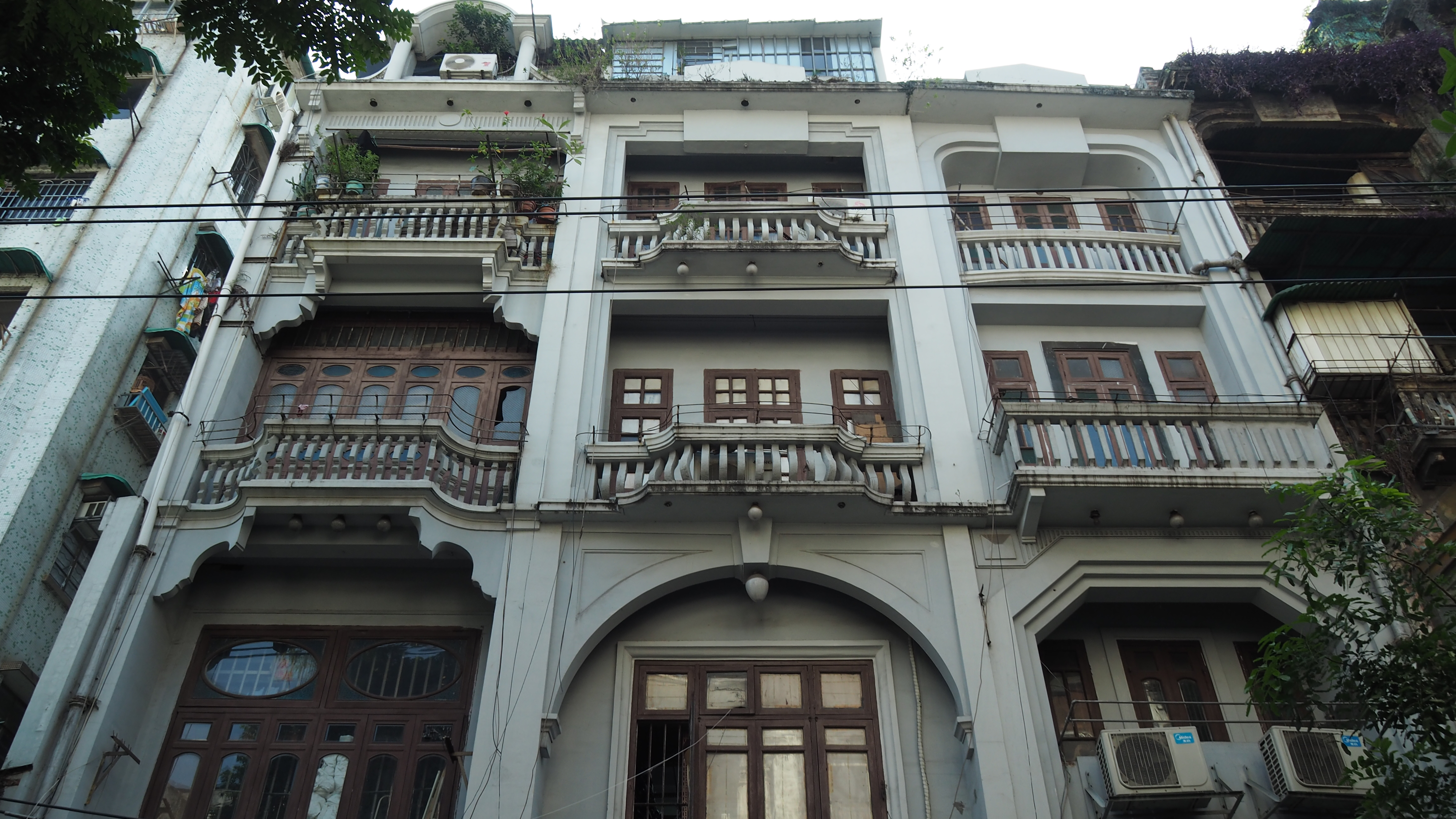 中文（中国大陆）: 位于广东省广州市荔湾区和平东路59号。